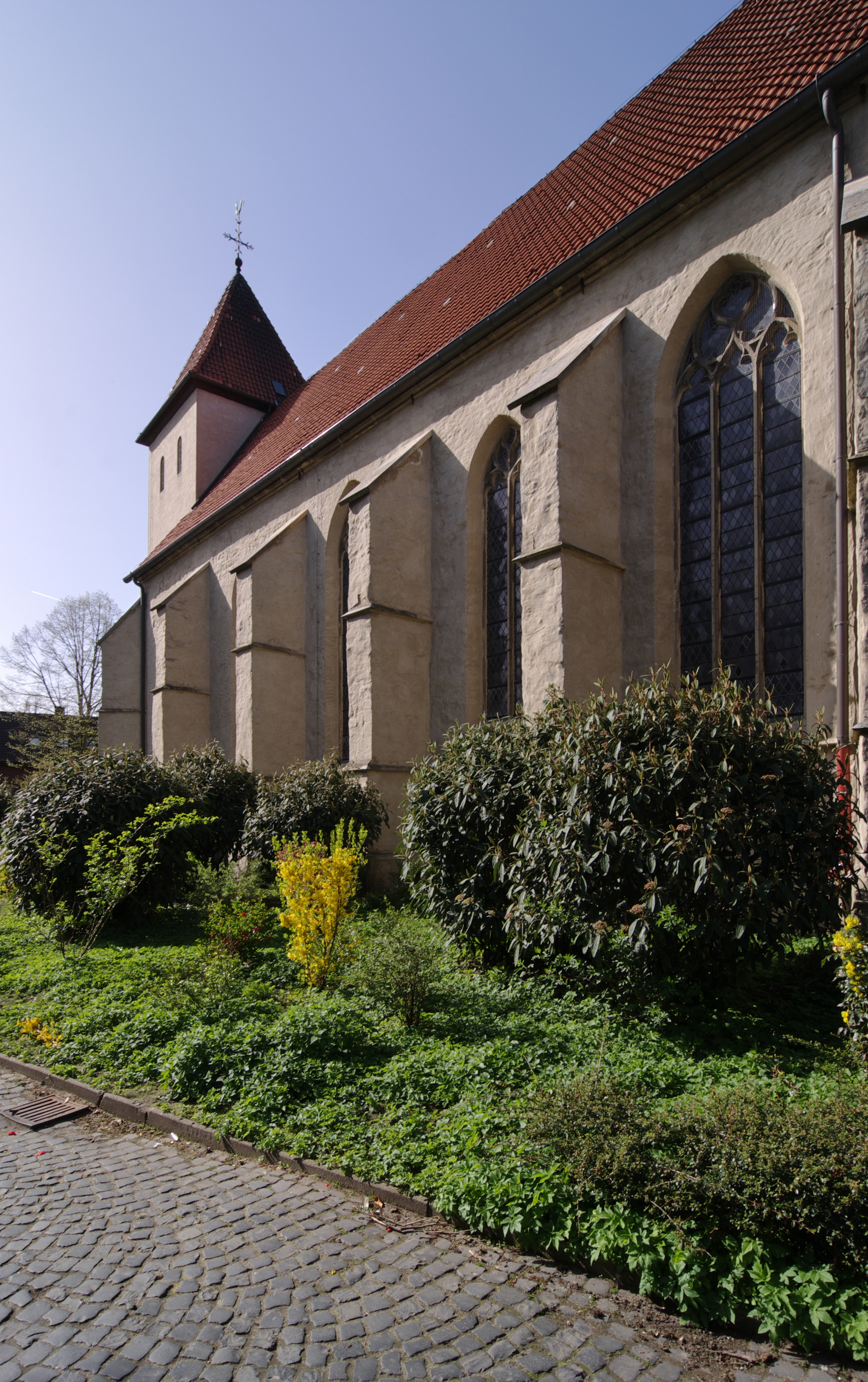 Friedenskirche in Selm, Kreis Unna, Nordrhein-Westfalen.